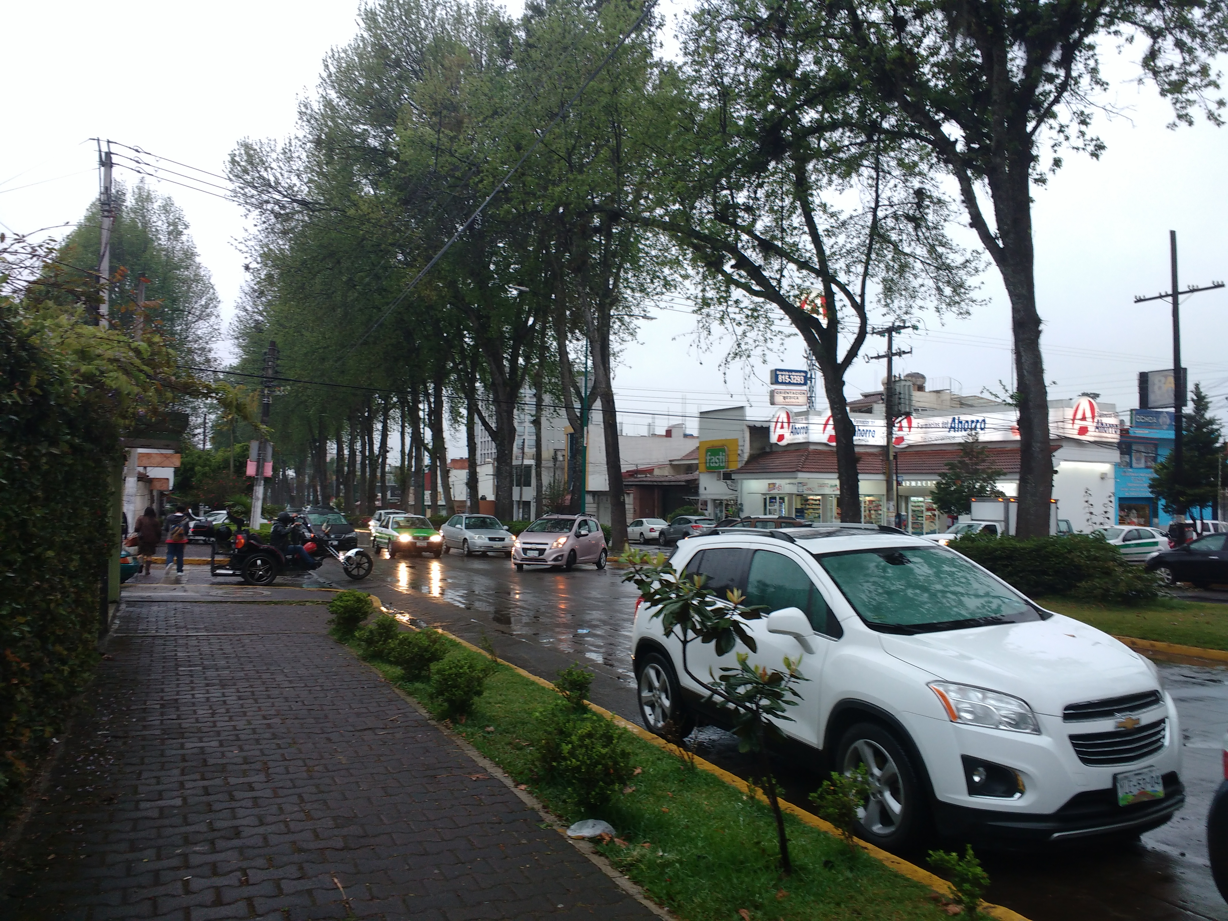 esta es la avenida orizaba de xalapa